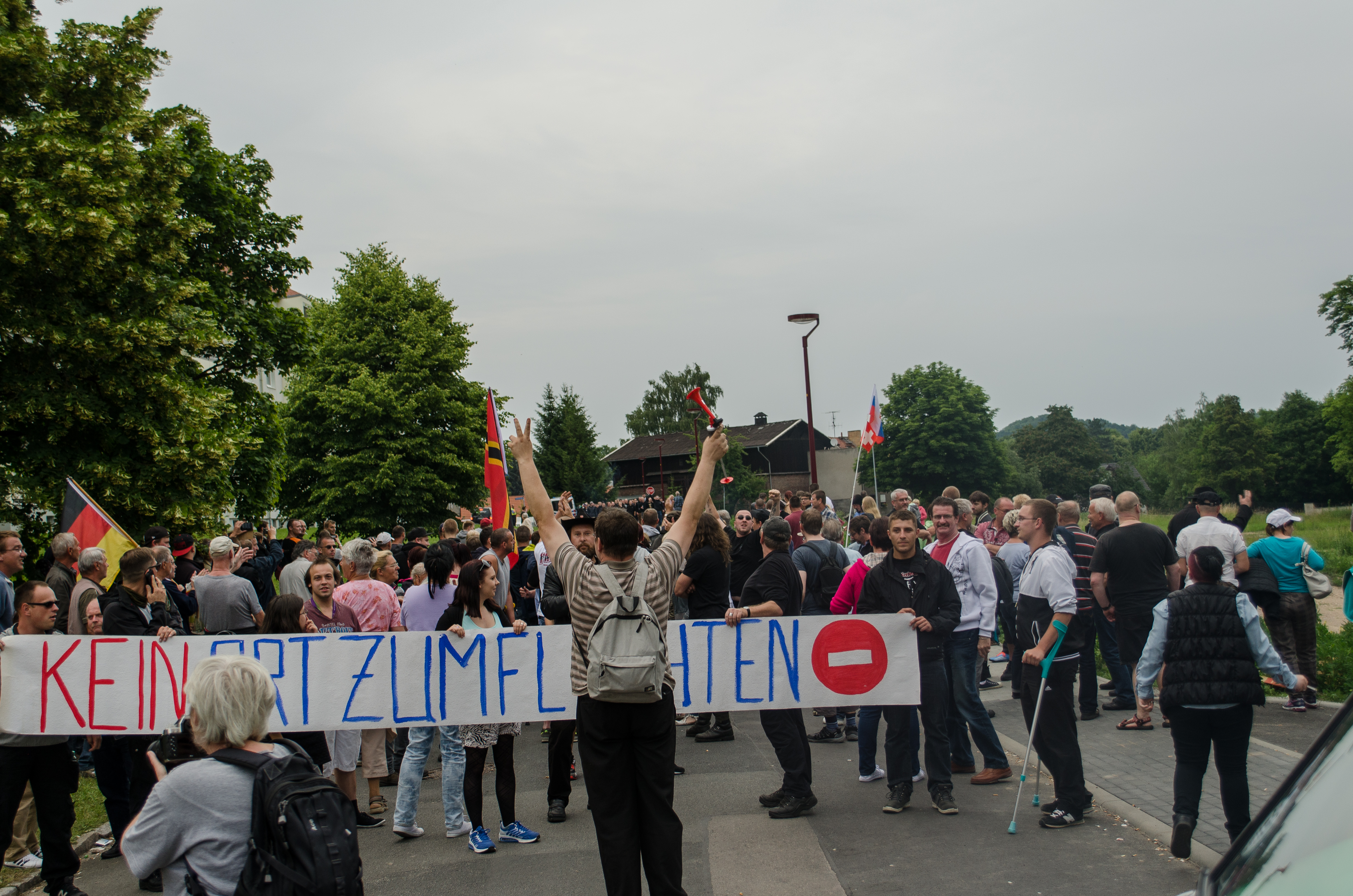 Freital 26.06.2015